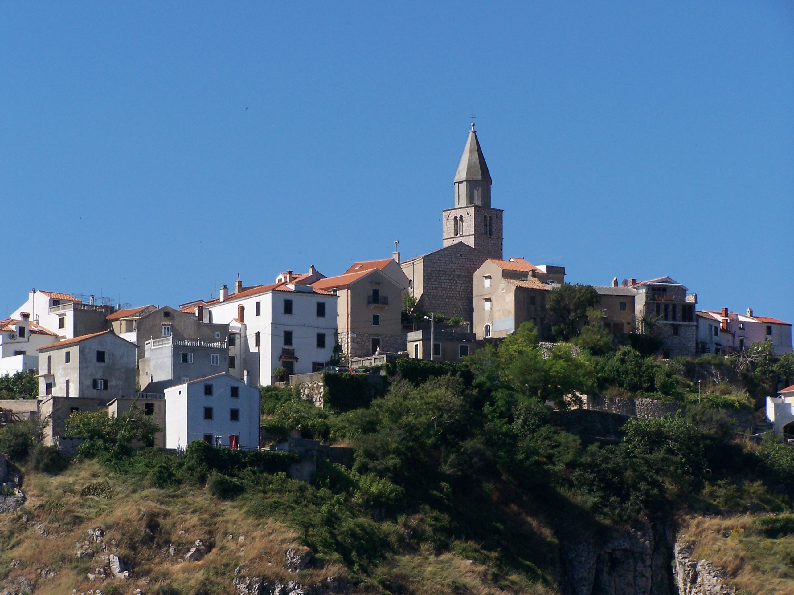 Widok na Vrbink - miasto położone na wyspie Krk, Chorwacja. Photo by Kuba Cieślakiewicz